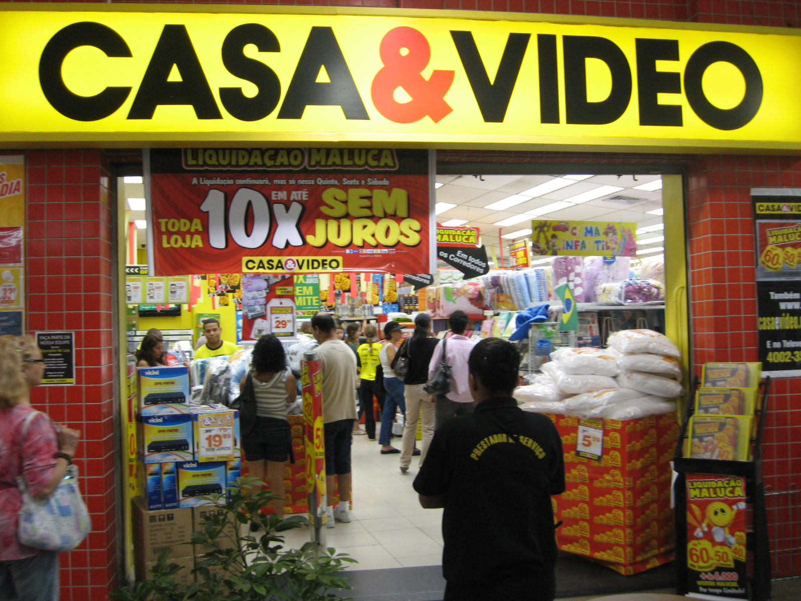 Loja da Casa & Vídeo localizada na Tijuca, Rio de Janeiro, RJ.